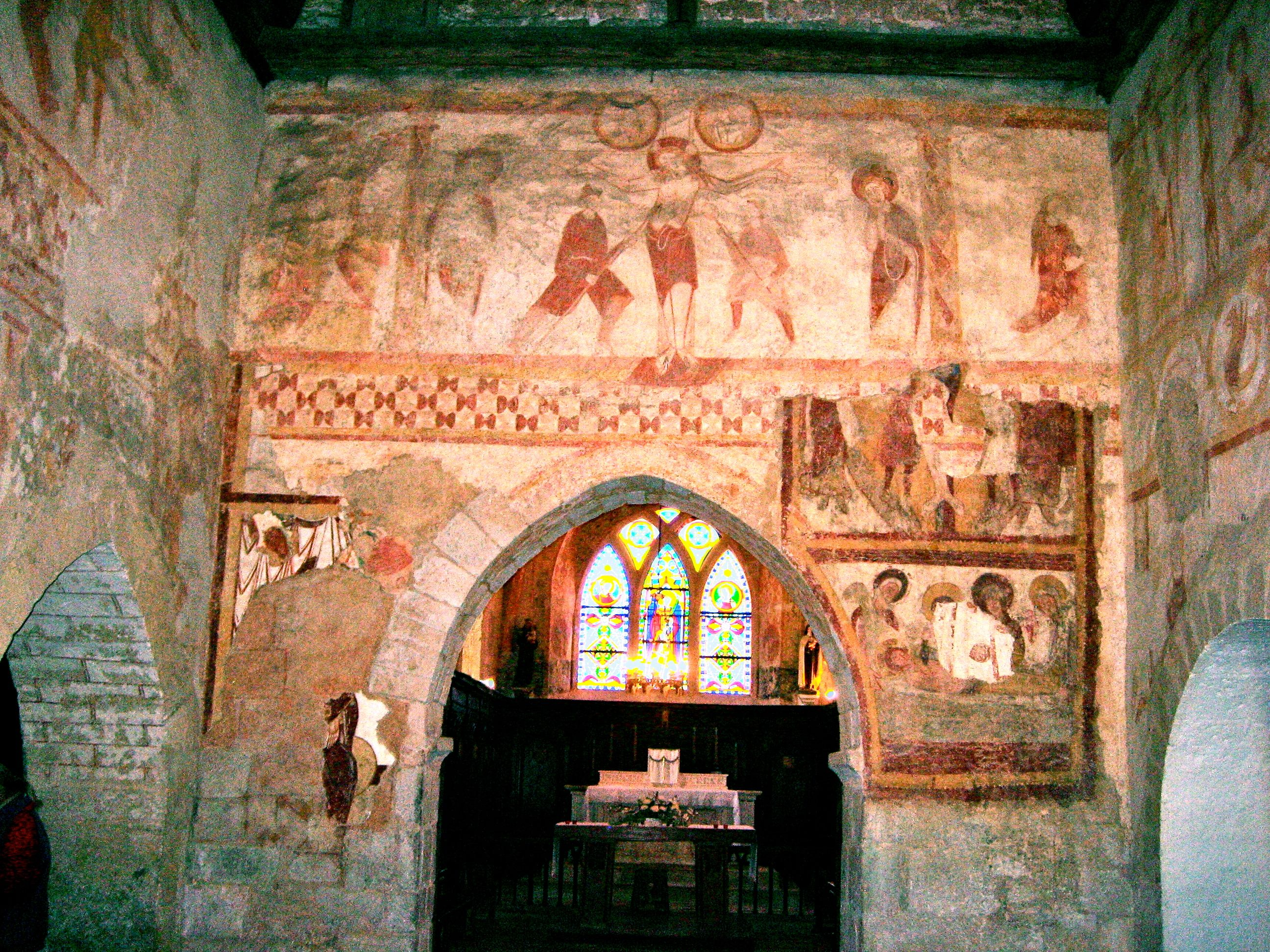 Église Saint-Laurent de Lourouer Saint-Laurent: disposition des fresques du mur est de la nef